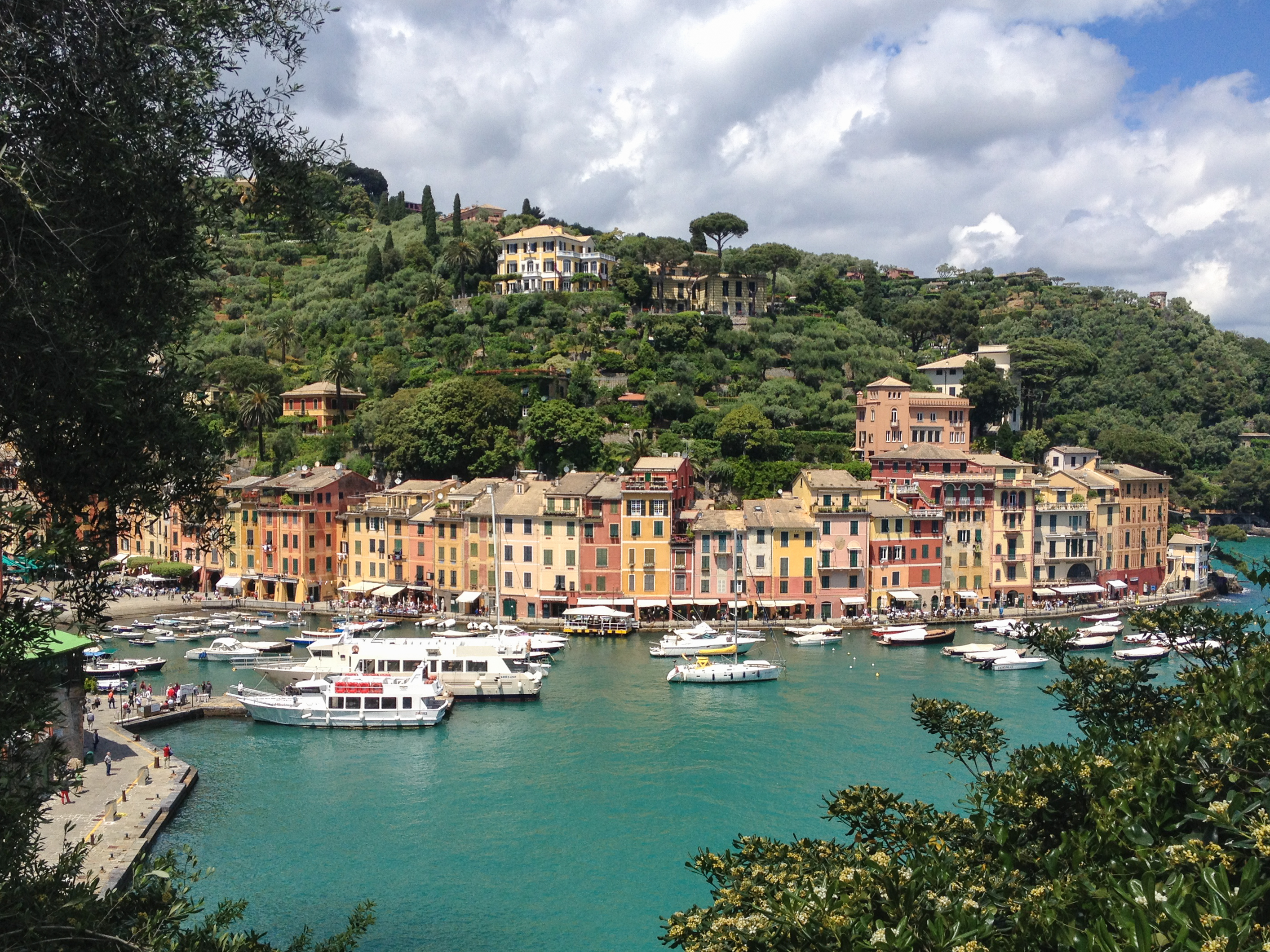 Portofino, Liguria